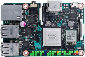 MiniPC Tinker-Board